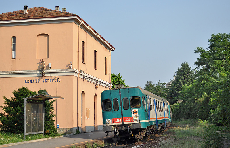 Composizione di automotrici ALn 668 con in testa la 1036 in sosta presso la stazione di Renate-Veduggio